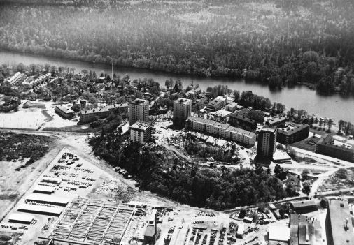 Tallbacken under uppförande, Atlas Copco i förgrunden, där centrallagret byggs